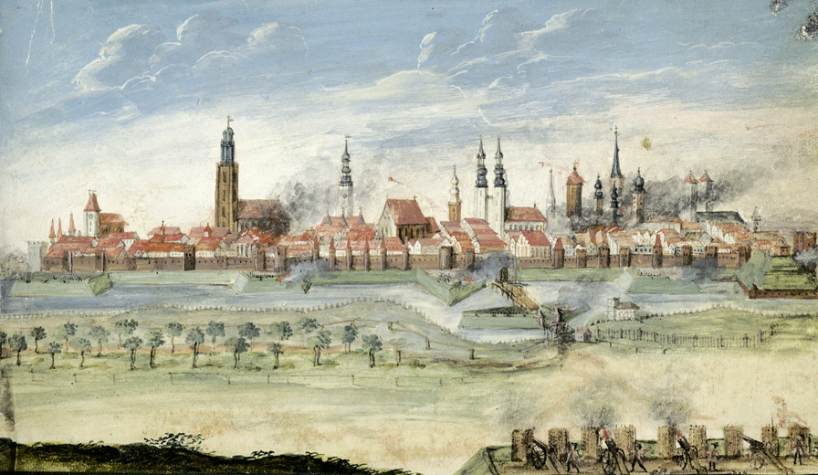 Breslau im Siebenjährigen Krieg. Aus dem Stammbuch des Kaufmanns Johann Gottfried Rüde aus Lauban (Schlesien), 1754-1796, mit Nachträgen 1869-1888; neben dem Eintrag vom 20. September 1760 "... erinnere Dich des 1ten Aug. 1760 unßer Stadt Breßlau; was Deine Jugend in einer Belagerung erfahren." Die Belagerung Breslaus und seine Bombardierung durch die Österreicher unter Ernst von Laudon. Breslau von Süden. Blick von den Anhöhen im Süden über den Schweidnitzer Anger zur Breslauer Altstadt. Im Vordergrund Kanonenbatterie; in der Bildmitte Kurtine des Äußeren Breslauer Festungsgürtels mit vorgelagertem mit Wasser gefüllten Festungsgraben (Schweidnitzer Stadtgraben), dazwischen zur Bastion mit Ravelin und Ravelinbrücke (Grabenbrücke) ausgebautes Äußeres Schweidnitzer Tor; im Hintergrund Breslauer Kirchen und Rathausturm unter Bombardement. Fliegende Kanonenkugeln; Rauchwolken innerhalb und ausserhalb des Festungsgürtels.